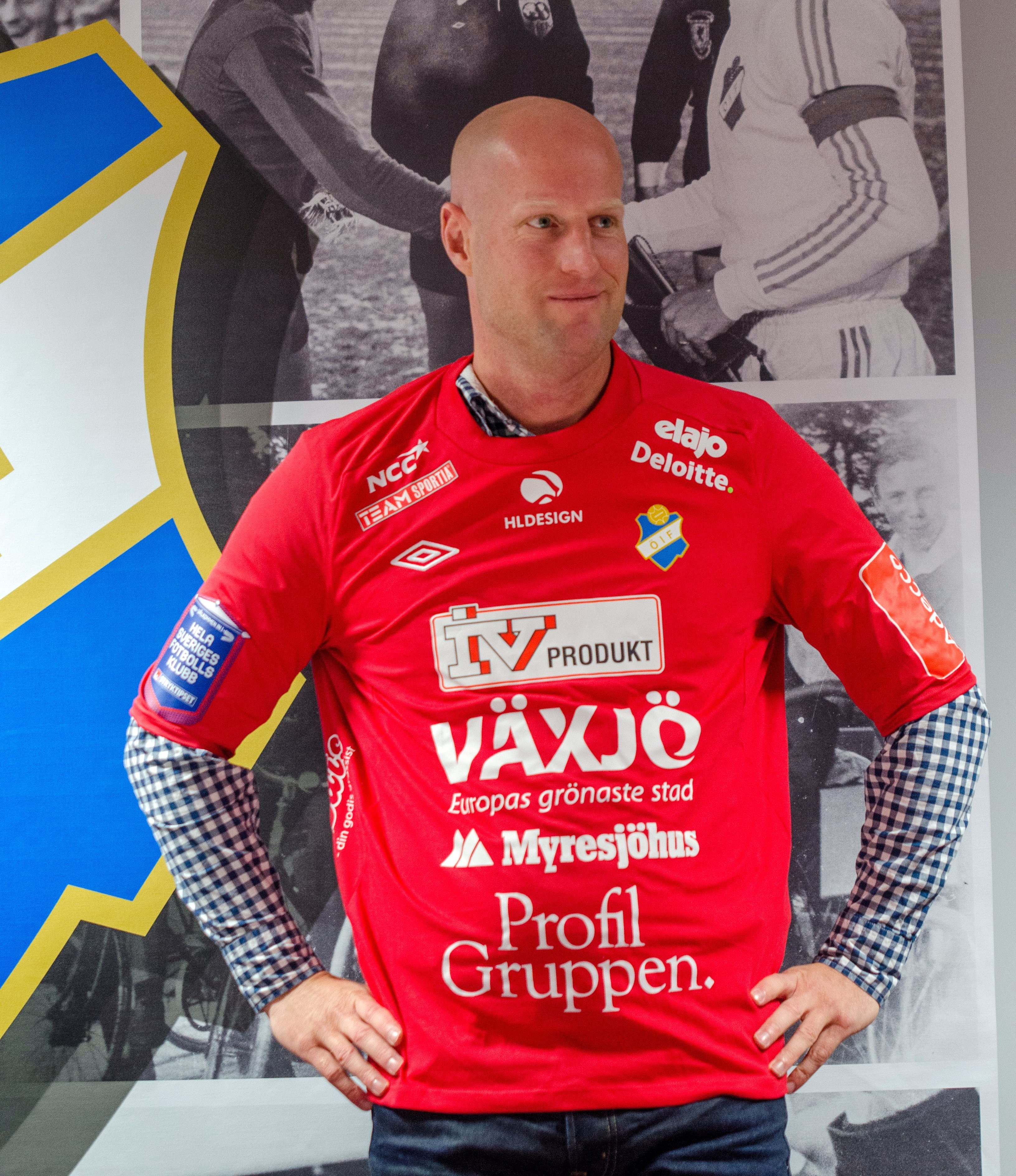 Andreas Thomsson presenteras som ny tränare för Östers IF, 3/12 2012.